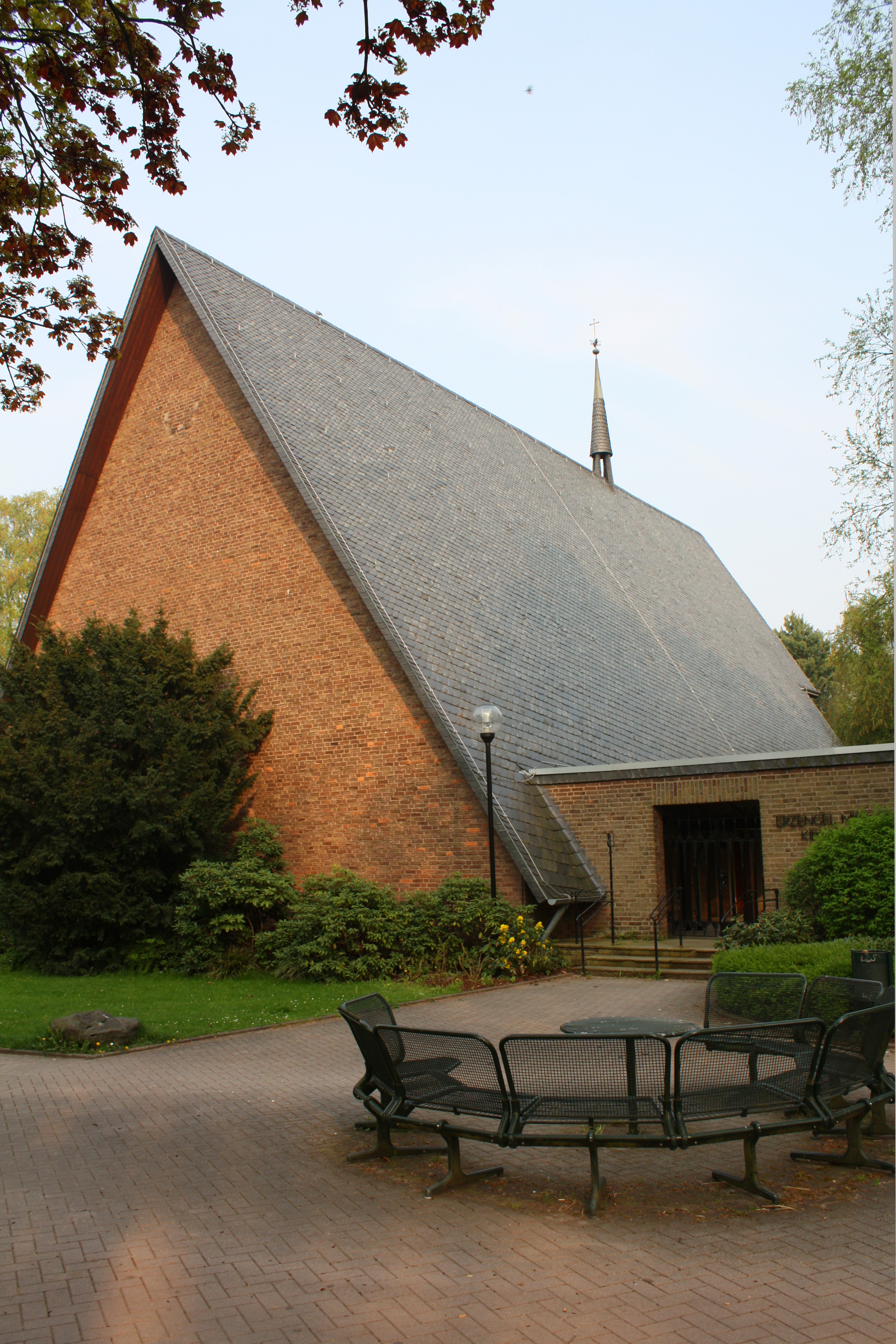 Köln-Rodenkirchen, Sürther Straße. Erzengel-Michael-Kirche in Michaelshoven This is a photograph of an architectural monument.